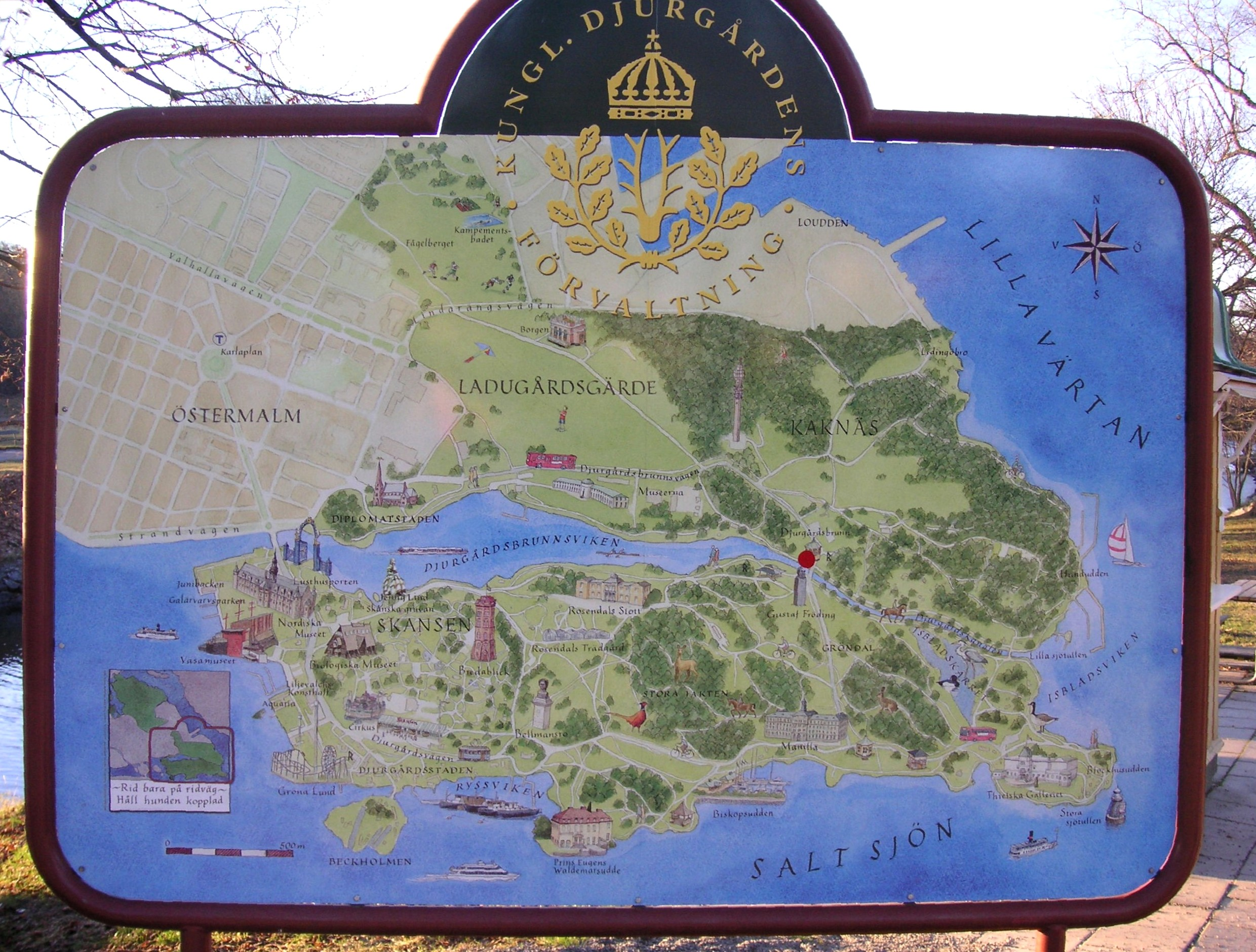 Infotavla södra Djurgården och Gärdet